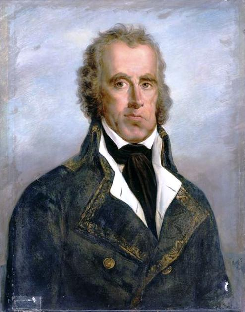 Commandé par Louis-Philippe pour le musée historique de Versailles en 1834